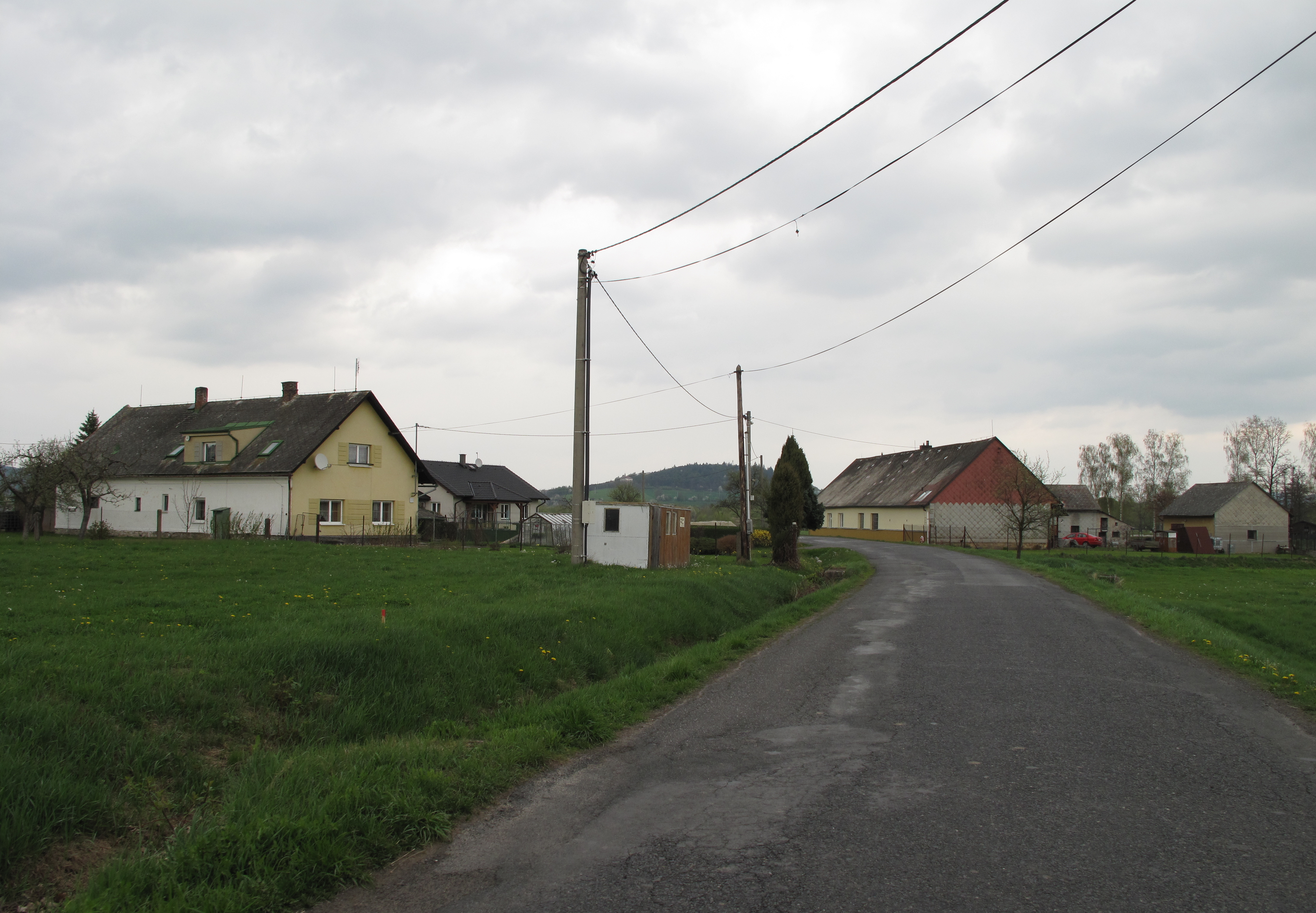 Poborovice. Okres Klatovy, Česká republika.